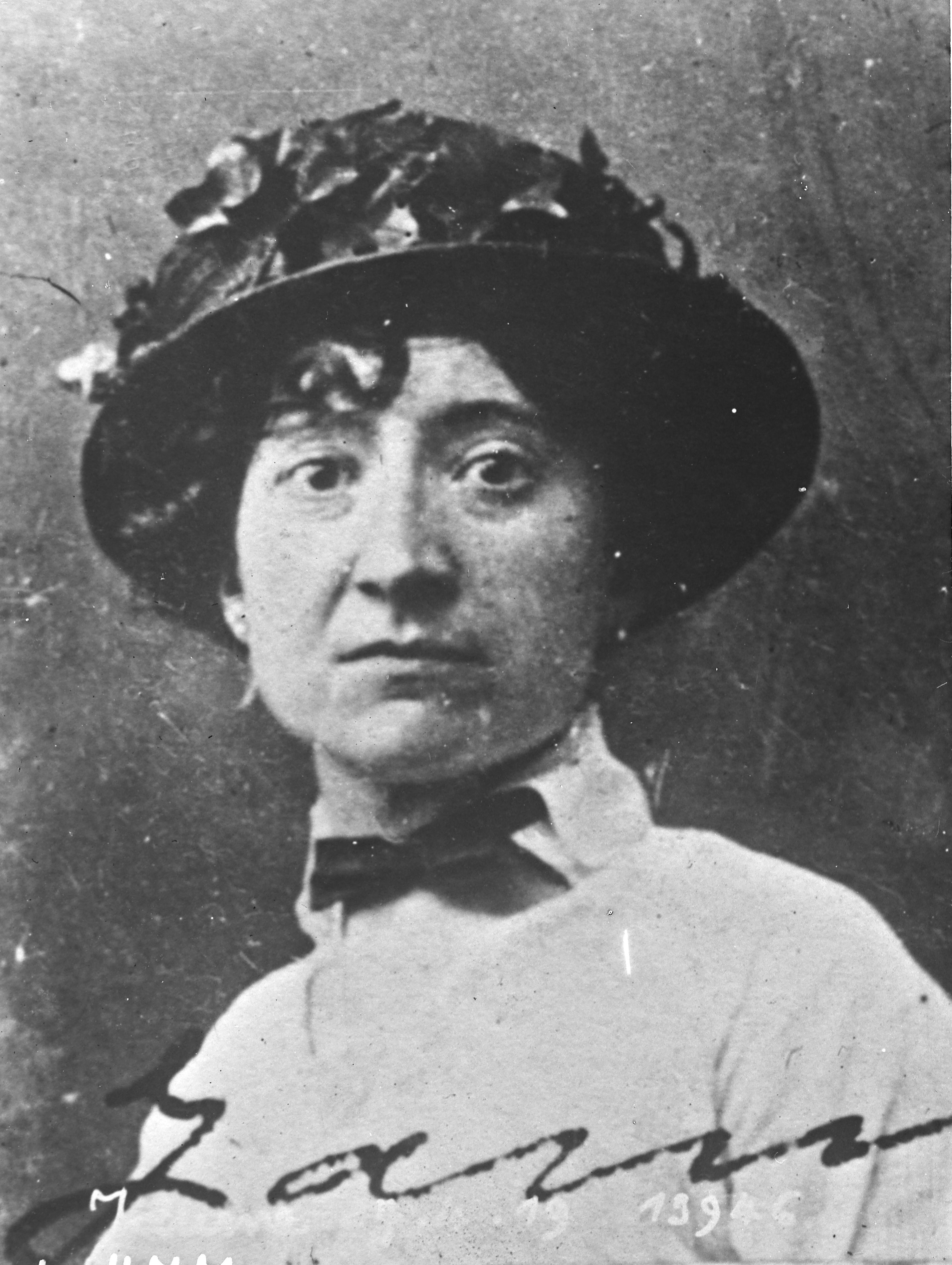 Louise-Léopoldine Jaume, neuvième victime de Landru.